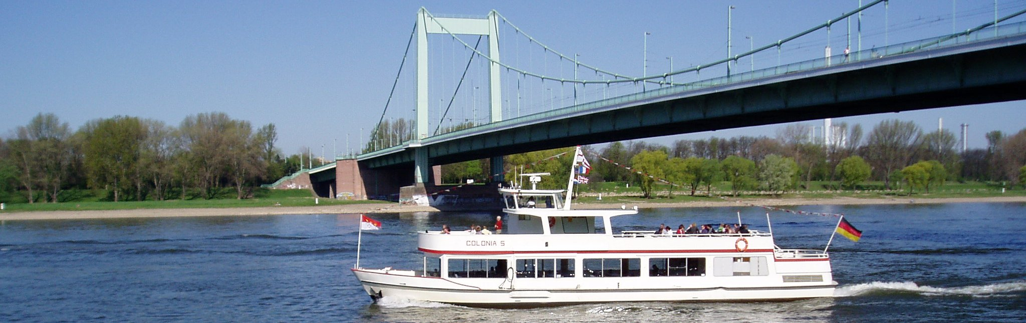 Köln-Mülheim, Brücke mit Rundfahrschiff (Breit für Infobox)